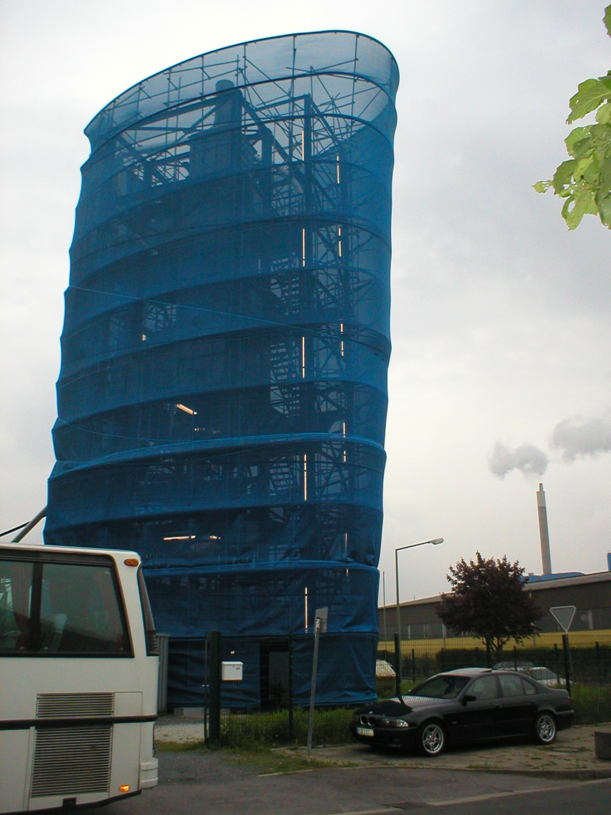 Zeigt den "Blauen Turm" in einer früheren Variante aus dem jahr 2003